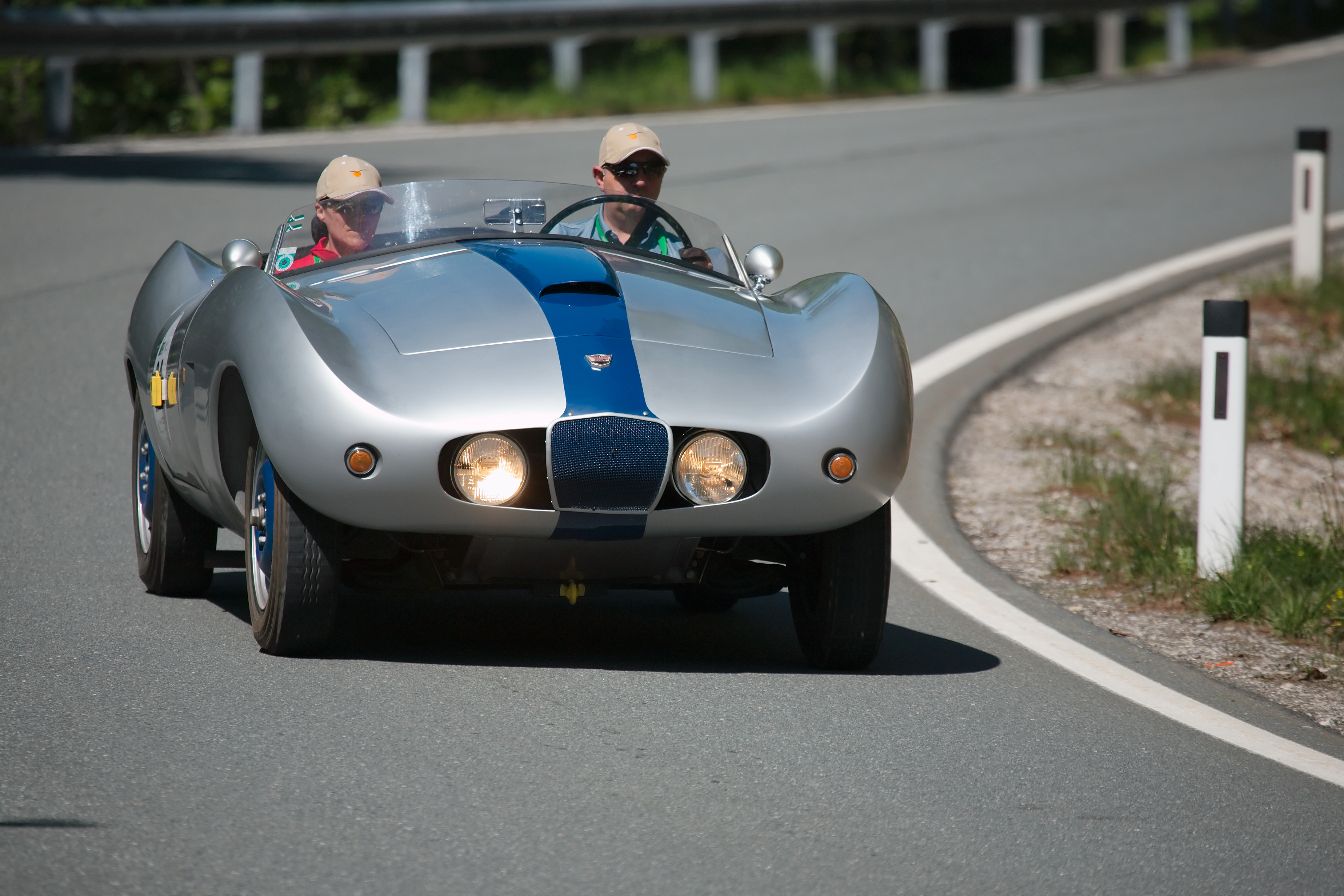 Arnolt Bristol (1952) at Gaisbergrennen 2009